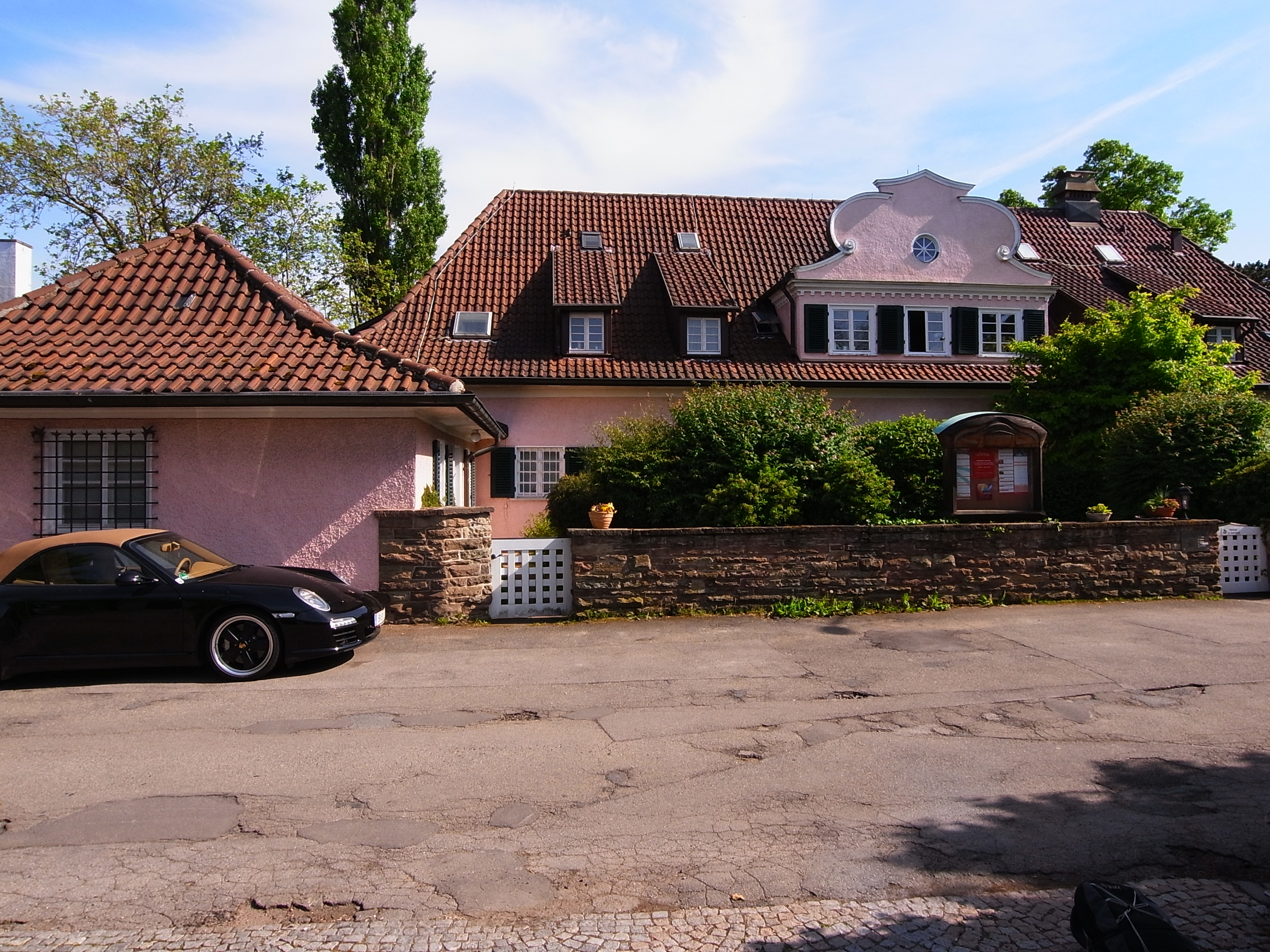 Das Fabrikanten-Landhaus der Lederunternehmerfamilie Roser